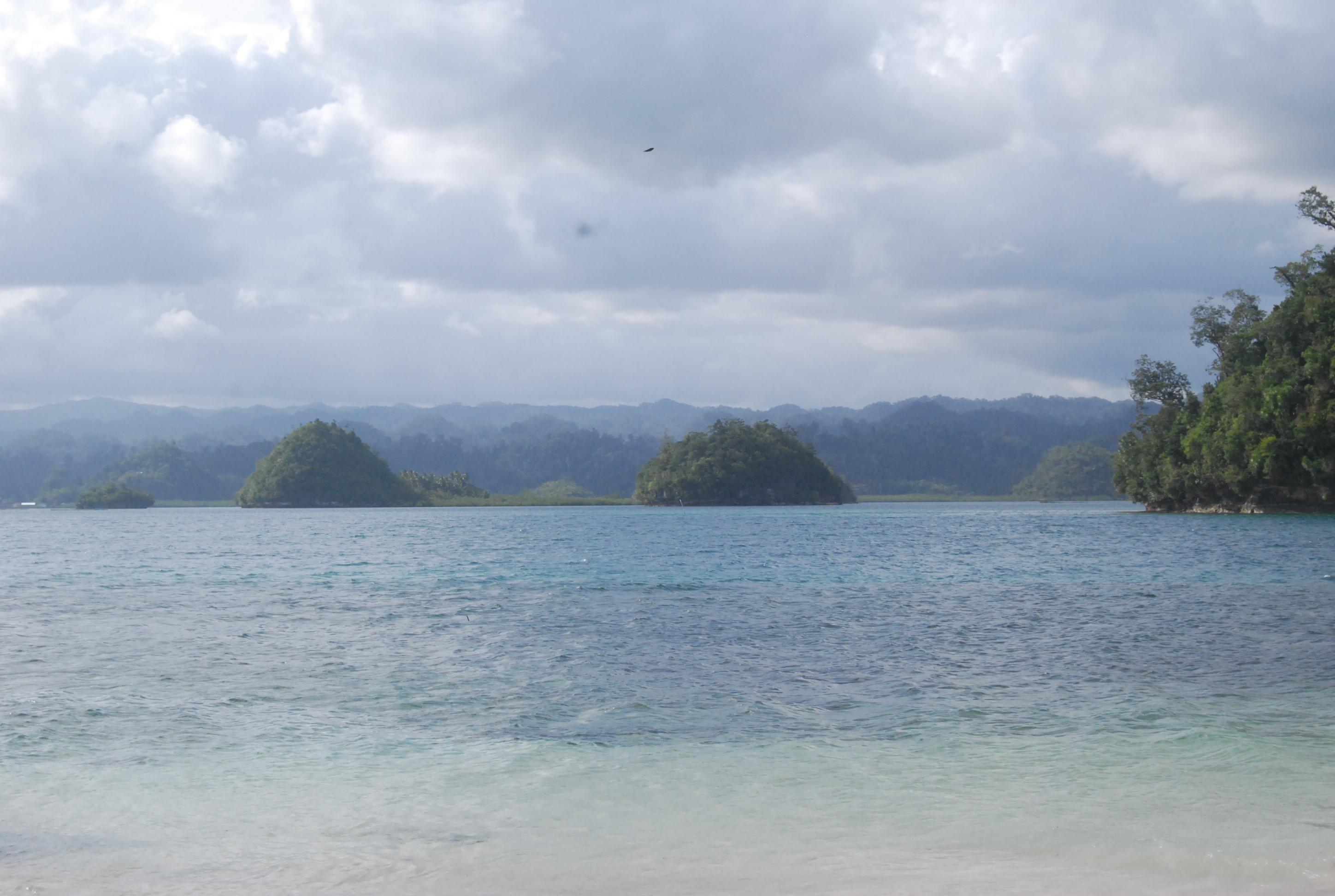 Britania Islands (San Agustin, Surigao del Sur, Philippines)